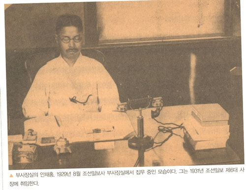 1929년, 조선일보 부사장 시절. 민세 안재홍.